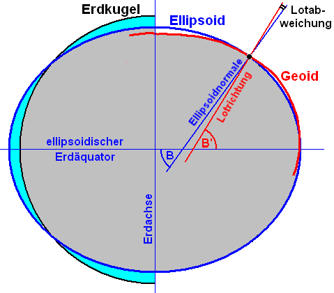 Die Lotabweichung ist die Differenz zwischen wahrer und ellipsoidischer Lotrichtung der Anstieg des Geoids (Meeresspiegel) gegenüber dem mittleren Erdellipsoid unvermeidliche systematische Differenz bei der astronomischen "Orts"bestimmung, analog dem Stehachsenfehler bei einem Theodoliten